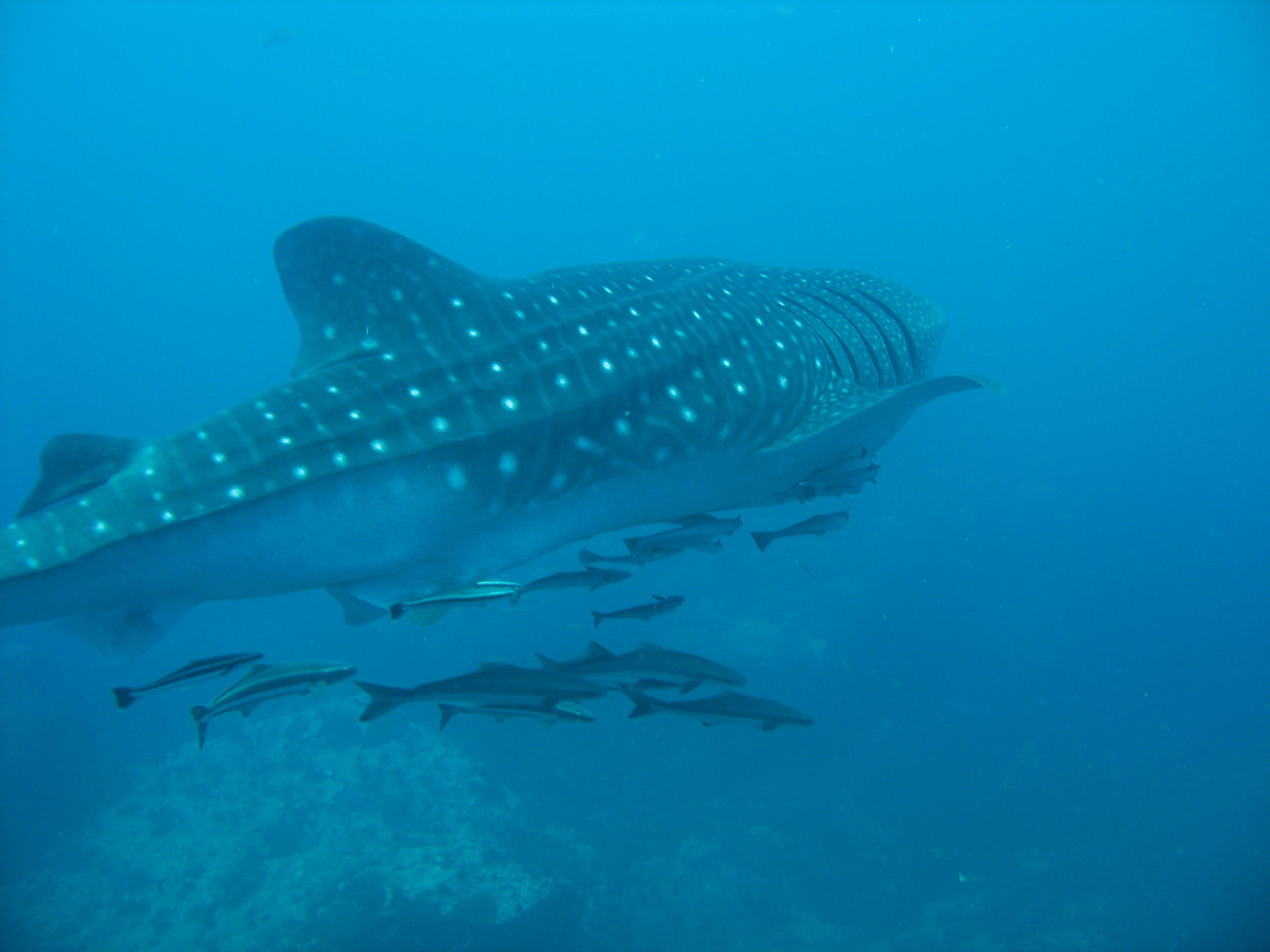 Whaleshark